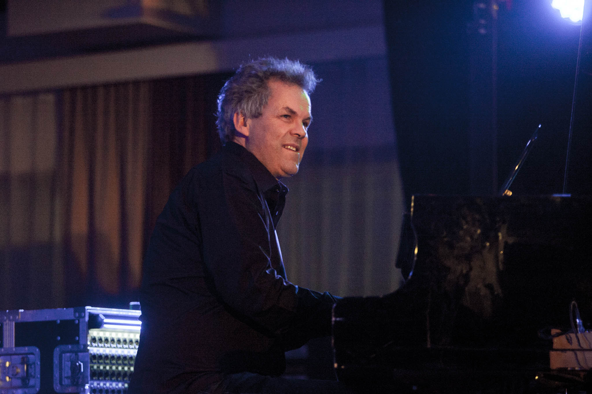 Jan Gunnar Hoff under Bodø Jazz Open 2013